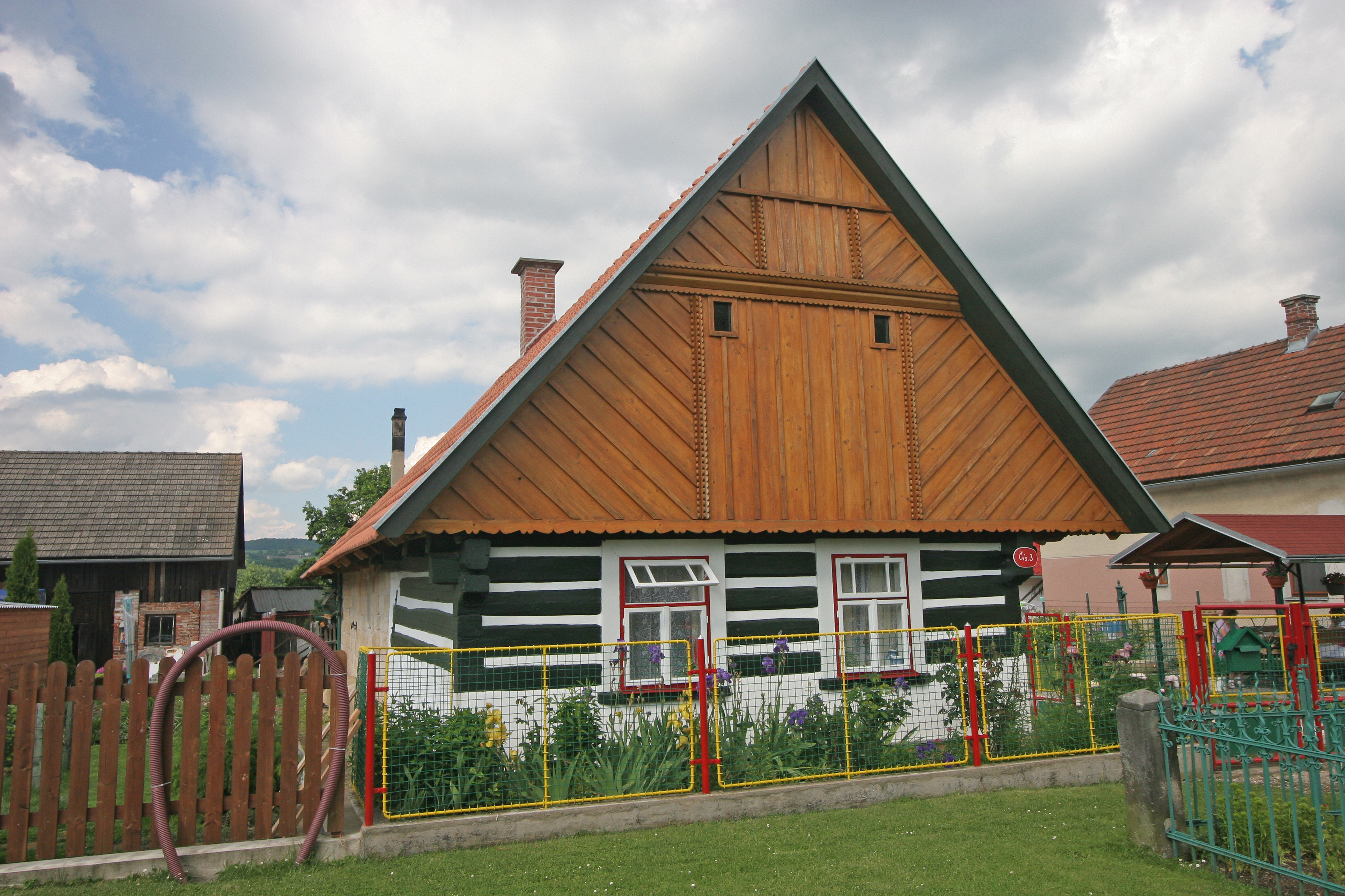 Vlkanov čp. 3